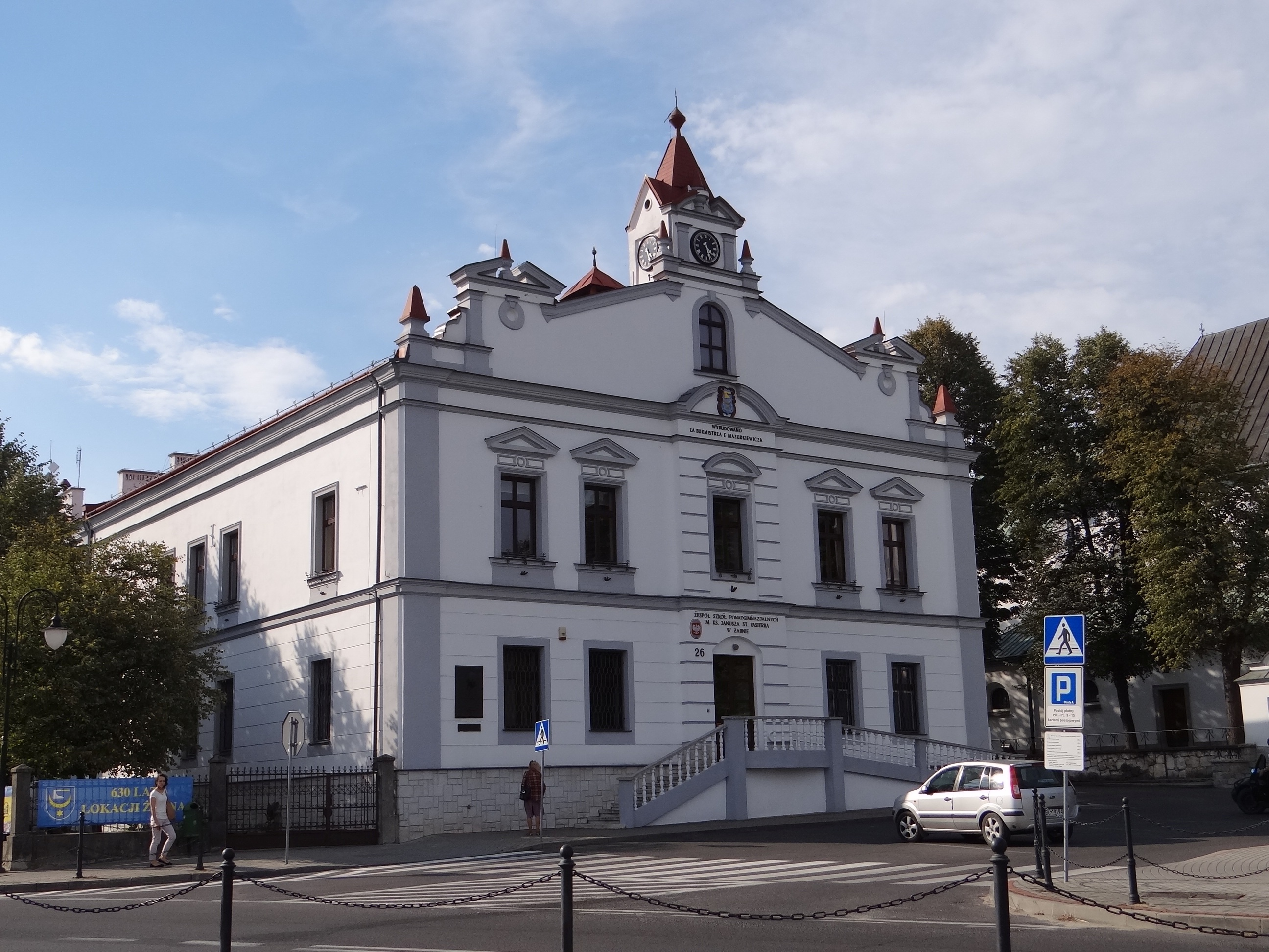 Żabno